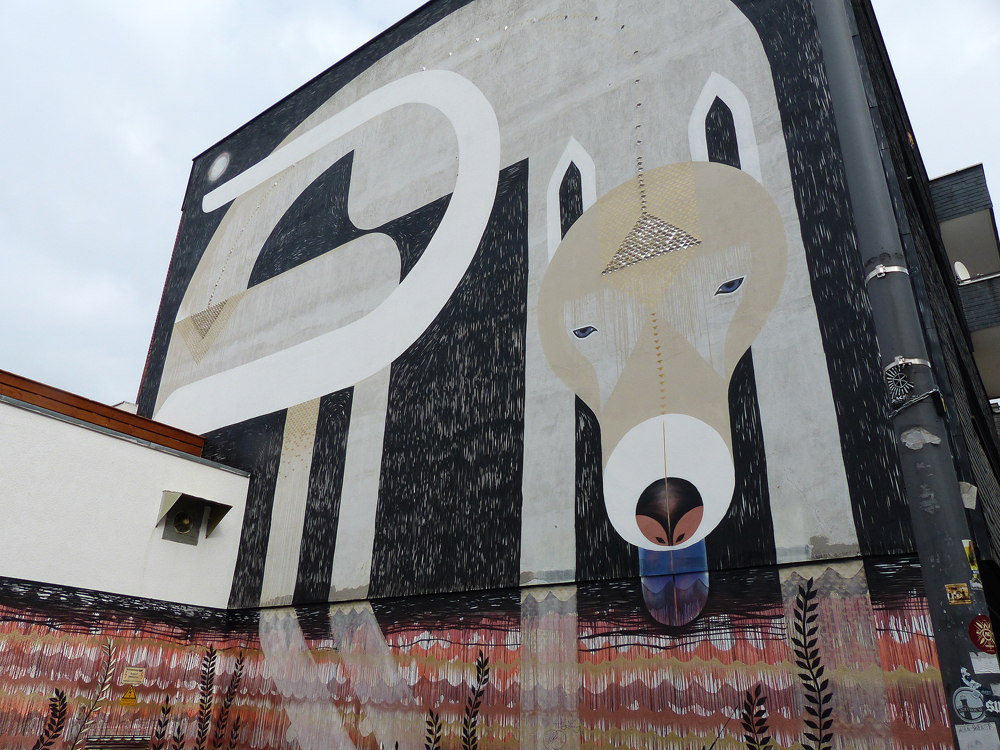 Mural von TIKA in Köln-Ehrenfeld